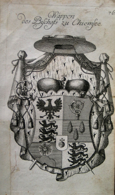 Wappen des Franz Karl Eusebius von Waldburg-Friedberg und Trauchburg, Bischof zu Chiemsee, 1767. Kupferstich, Blatt: 11,5 x 19 cm, aus: "Der durchlauchtigen Welt vollständiges Wappenbuch".